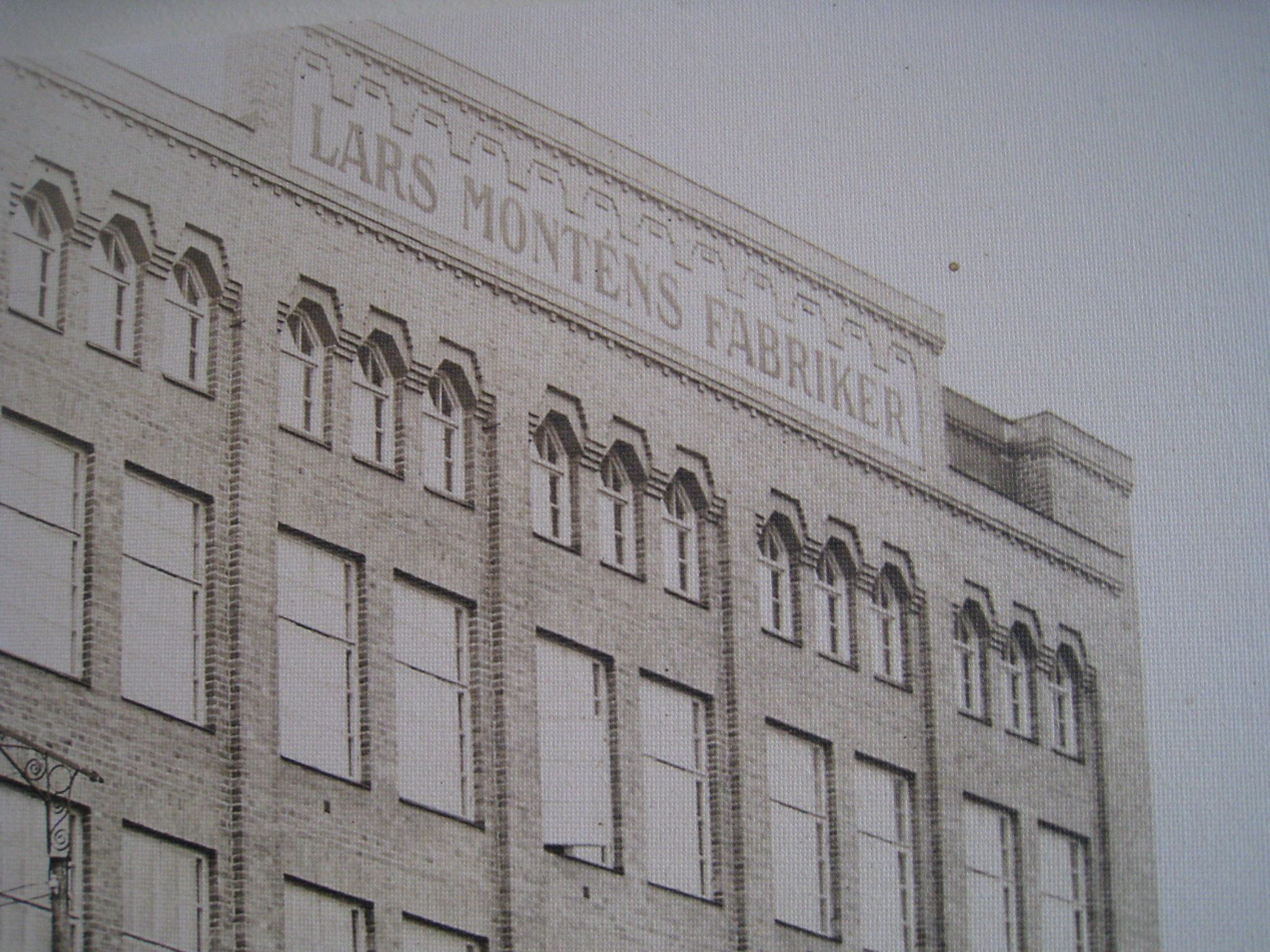 Barnängens Tekniska Fabrik, 1915-1929, Alviks Strand, Bromma, Stockholm. Lars Monténs fabriker 1915-1929, bild från Henkels arkiv hos Centrum för Näringslivshistoria. Foto 2016 av bild på väggen i Alviks Strand Konferens.